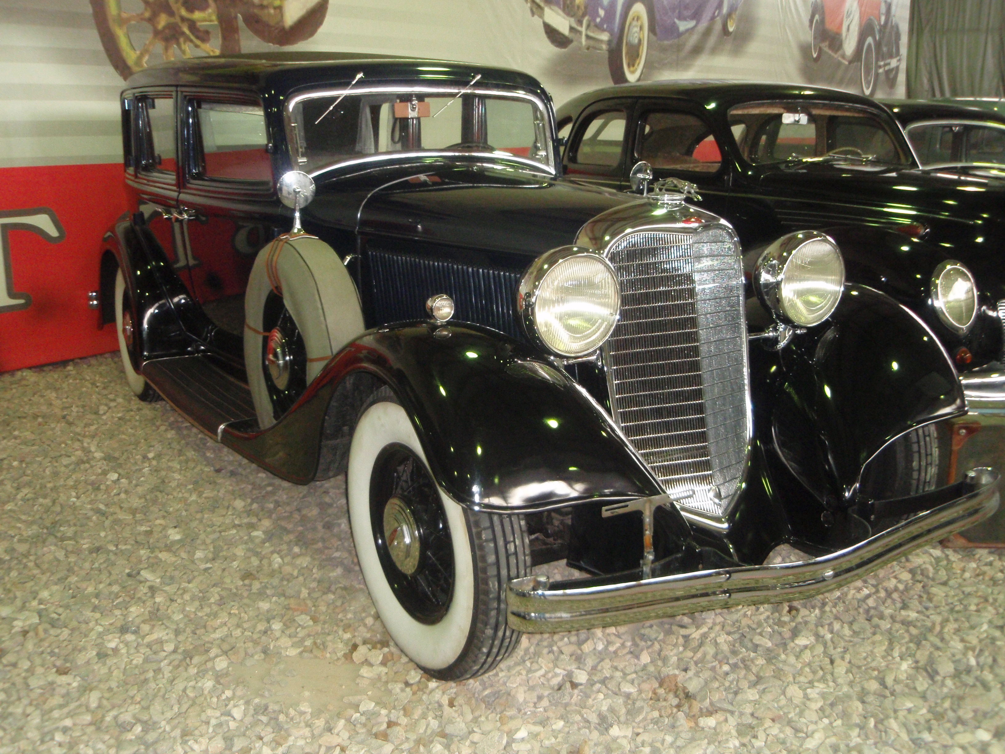 Автомобиль Lincoln "KB"